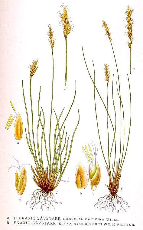 A. Carex simpliciuscula Wahlenb., syn. Kobresia simpliciuscula (Wahlenb.) Mack., Kobresia caricina Willd. B. Carex bistaminata (W.Z.Di & M.J.Zhong) S.R.Zhang, syn. Kobresia myosuroides (Vill.) Fiori, Elyna myosuroides (Vill.) Fritsch. Original Description A. Fleraxig sävstarr, Cobresia caricina Willd. B. Enaxig sävstarr, Elyna myosuroides (Vill.) Fritsch.